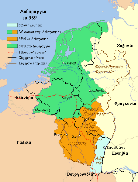 Ο διαχωρισμός της Λοθαριγγίας το 959